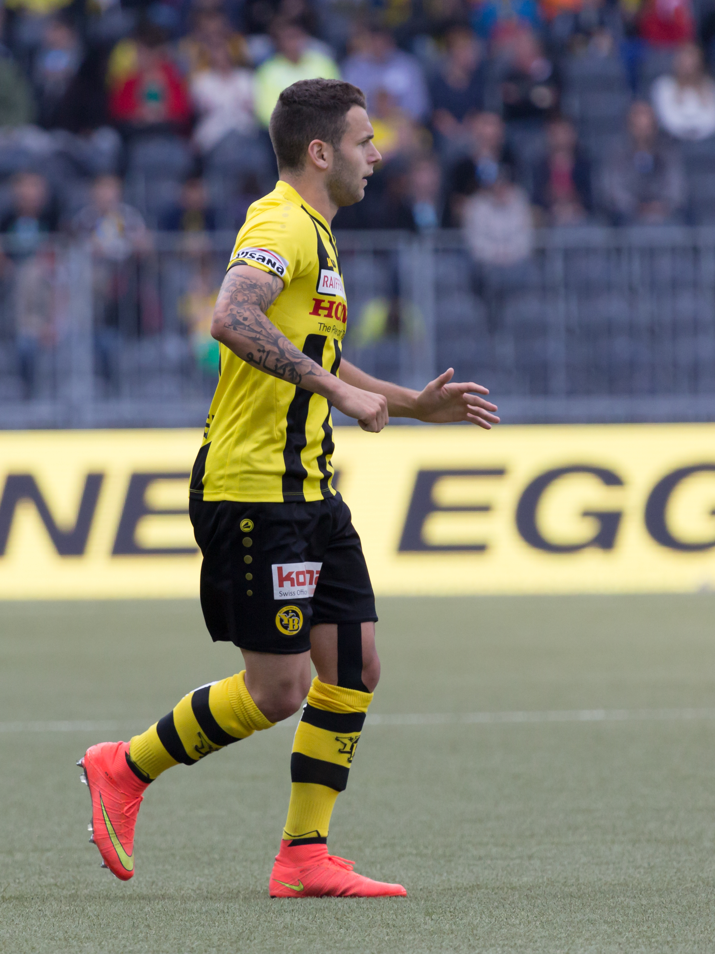 Renato Steffen beim Spiel des BSC Young Boys gegen den FC Luzern